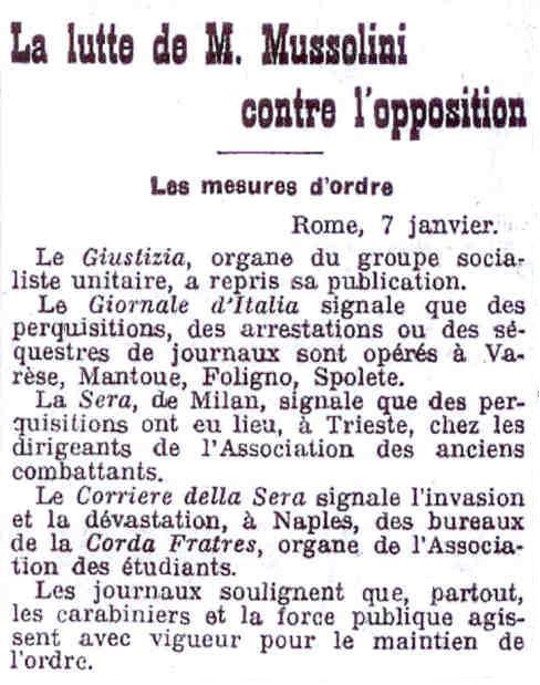 Article où il est notamment question de la Corda Fratres.